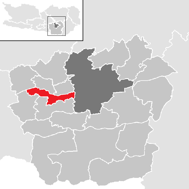 Bezirk Klagenfurt-Land